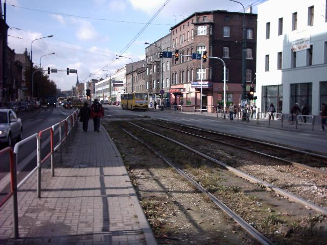 Katowice Zawodzie ul. 1 Maja (2005r.)